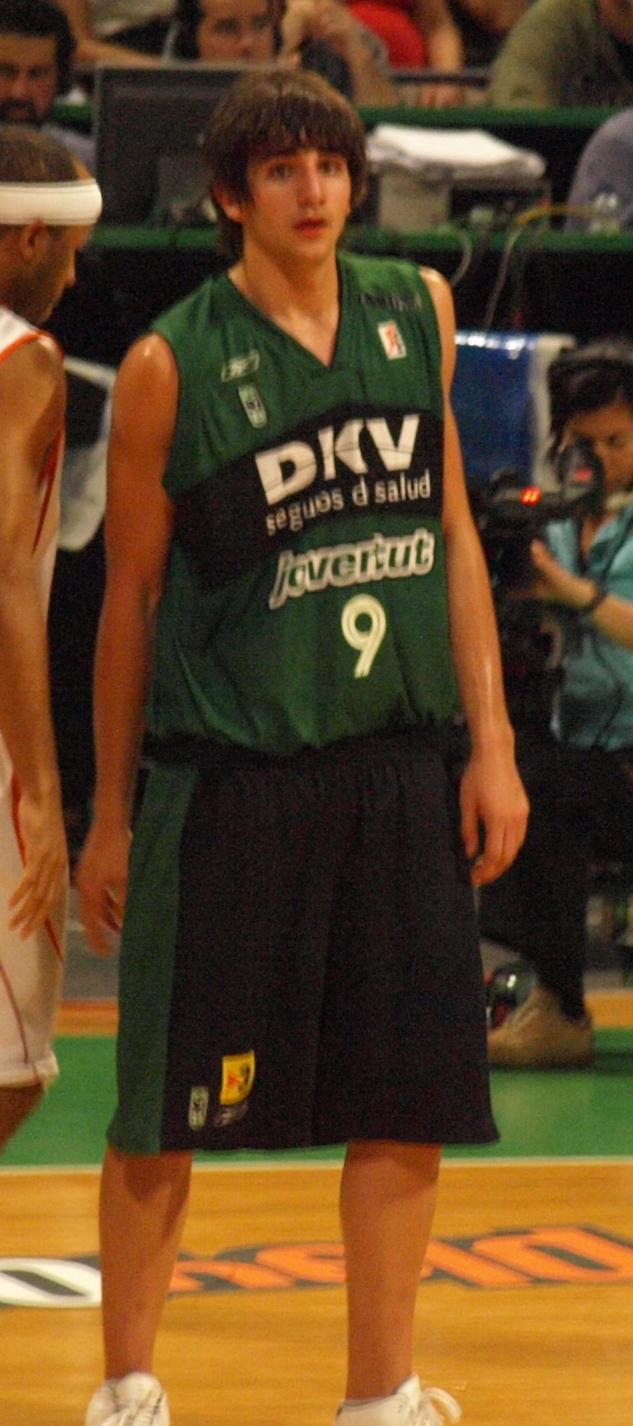 Ricky Rubio en un partido de los play-offs de la liga ACB 07-08 en el Olímpico de Badalona.